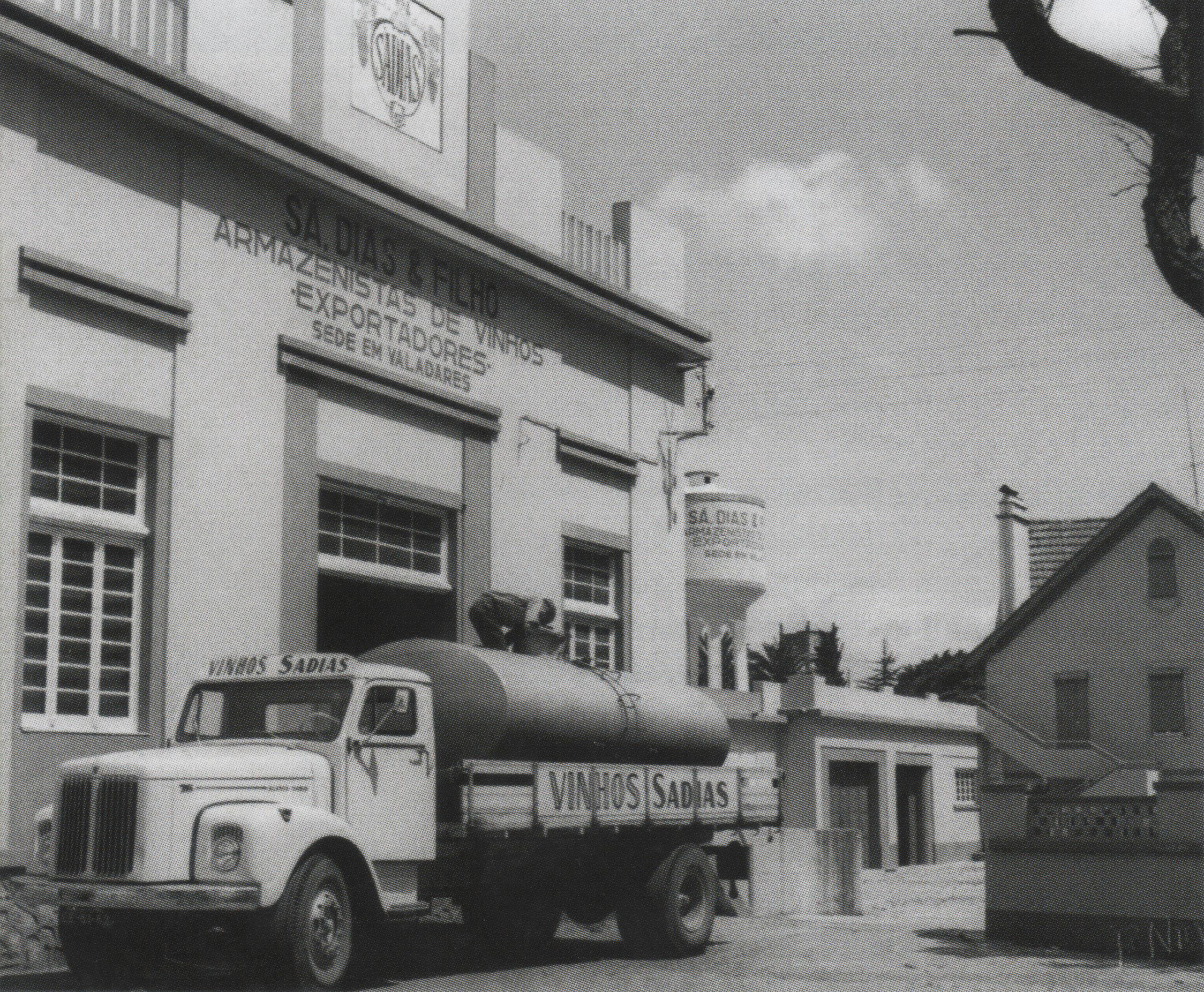 Armazéns SADIAS nos anos 50, Bombarral